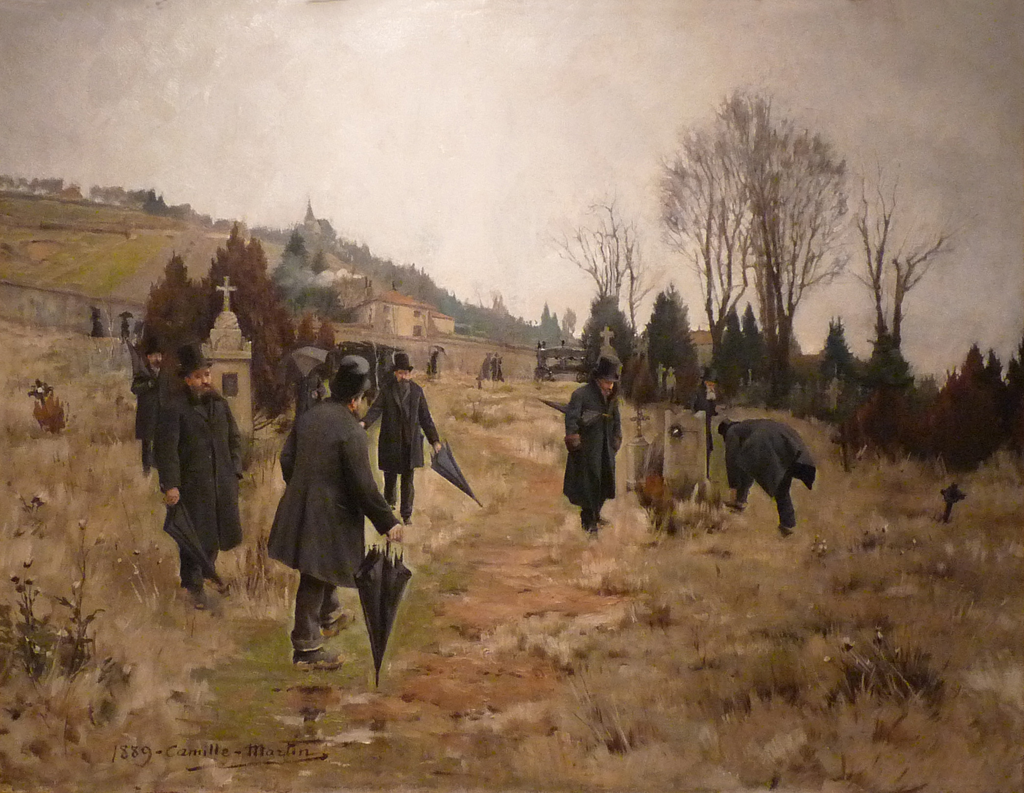 Camille Martin, Après l'enterrement, huile sur toile, 1889, Musée des beaux-arts de Nancy